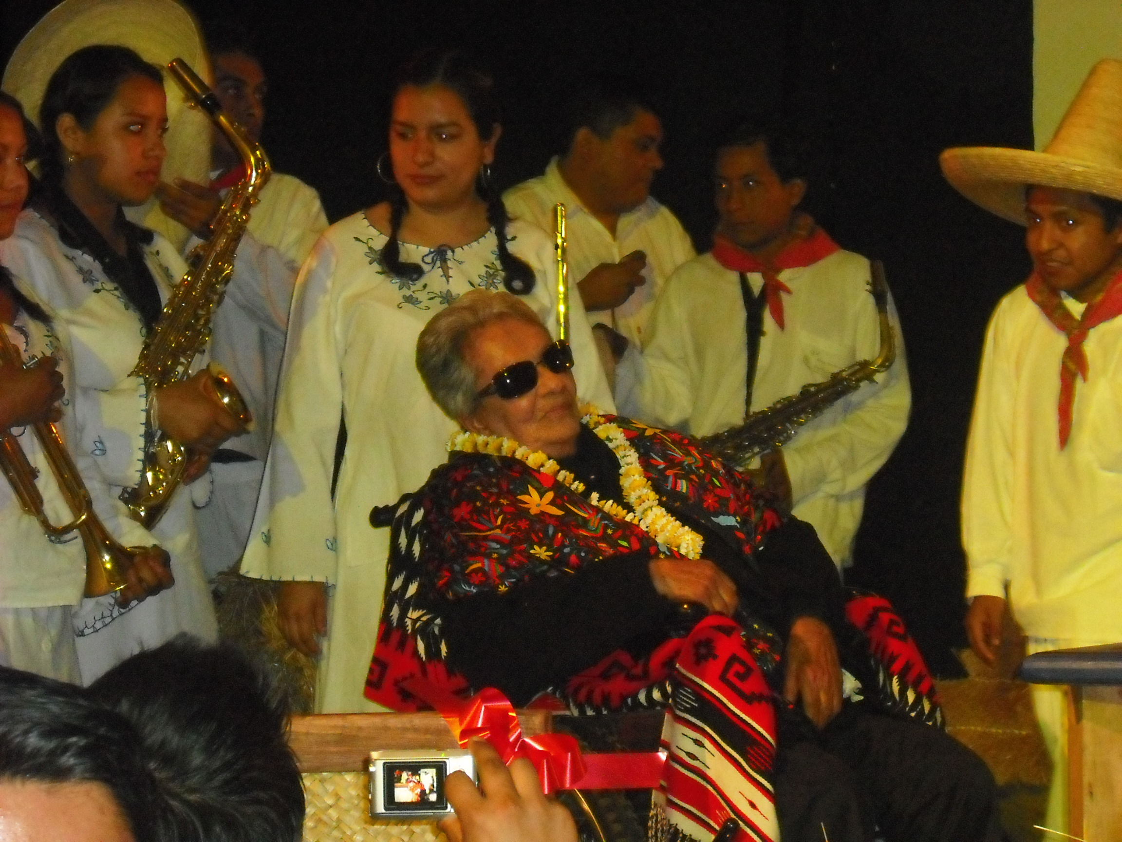 Durante el homenaje dedicado a la gran Chavela Vargas en Tepoztlán, Morelos, el 23 de noviembre de 2009. Aquí aparece con parte de la Banda de Tlayacapan.